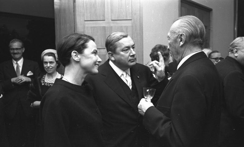 Bundeskanzler Adenauer empfängt 2. Hälfte der CDU-CSU-Fraktion 12.12.1962